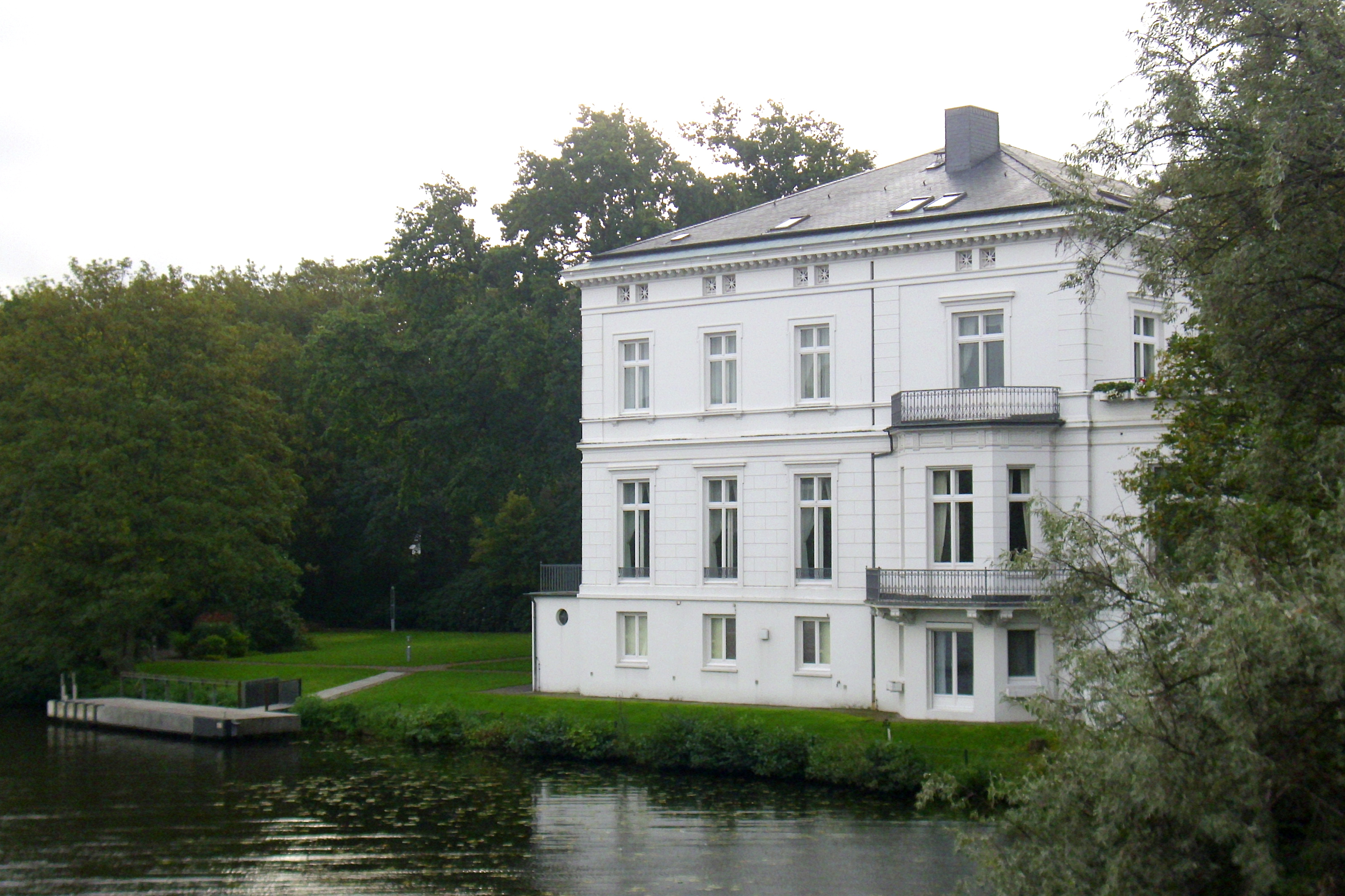 Gästehaus des Senats, Schöne Aussicht 26 This is a photograph of an architectural monument.